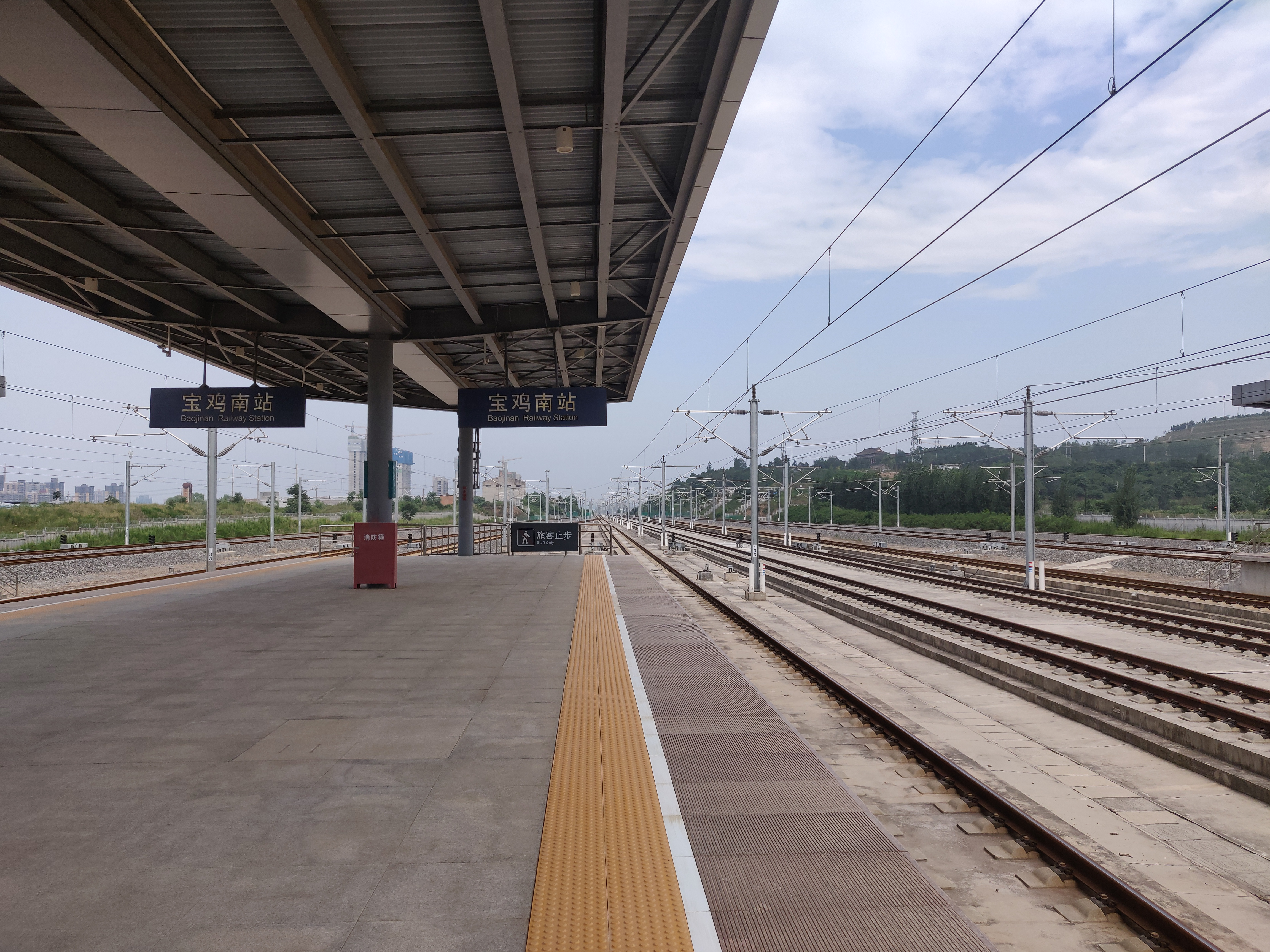 Platform at Baojinan Railway Station, tracks towards Xianbei Railway Station, shot on Jul 28, 2018